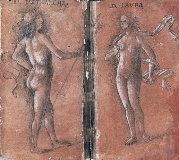 Laura as Venus (from Bibliotheca Nazionale Centrale di Roma MS Varia 3, ca. 1444)